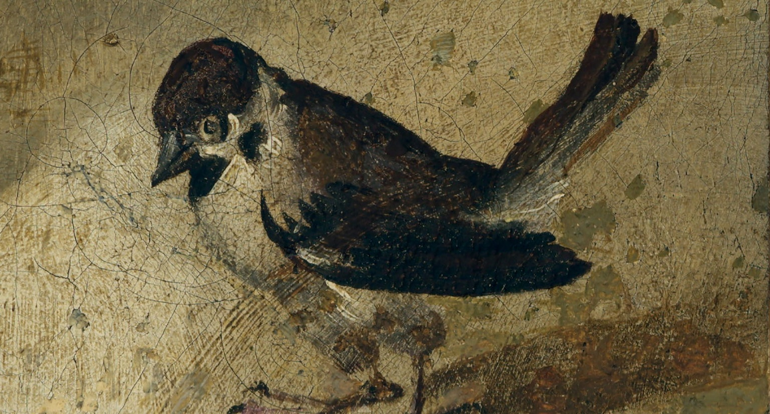 Invenzione della Vera Croce (dettaglio). L'inserimento di un passero nella composizione è un particolare che si riscontra più volte nelle opere del Passarotti ove è utilizzato, per l'assonanza con il cognome dell'artista, come firma allusiva